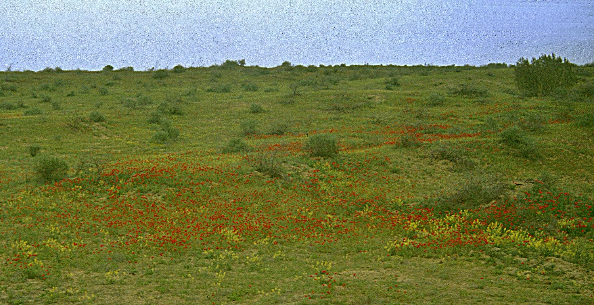 blühende Wüste Karakum